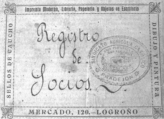 Sello del Sindicato Agrícola de Pradejón, en el libro de registro de socios.